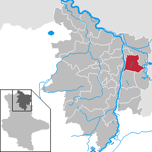 Kamern im Landkreis Stendal, Sachsen-Anhalt